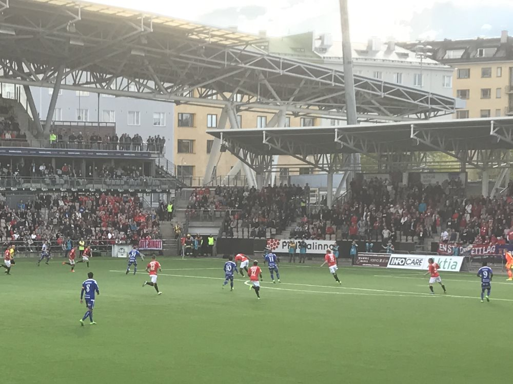 Stadin derby 23.5.2017 (1. kaudella 2017)